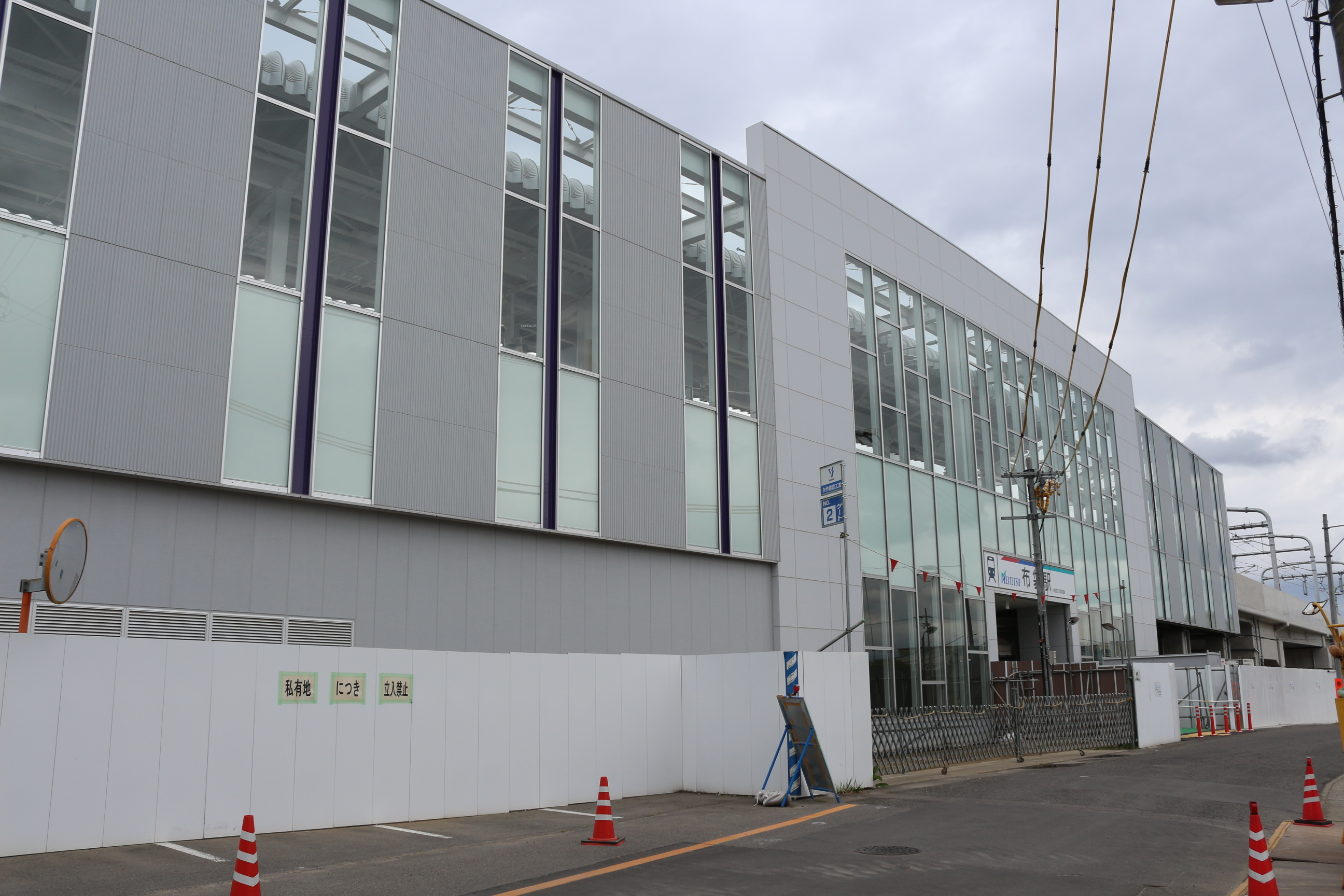 布袋駅東口